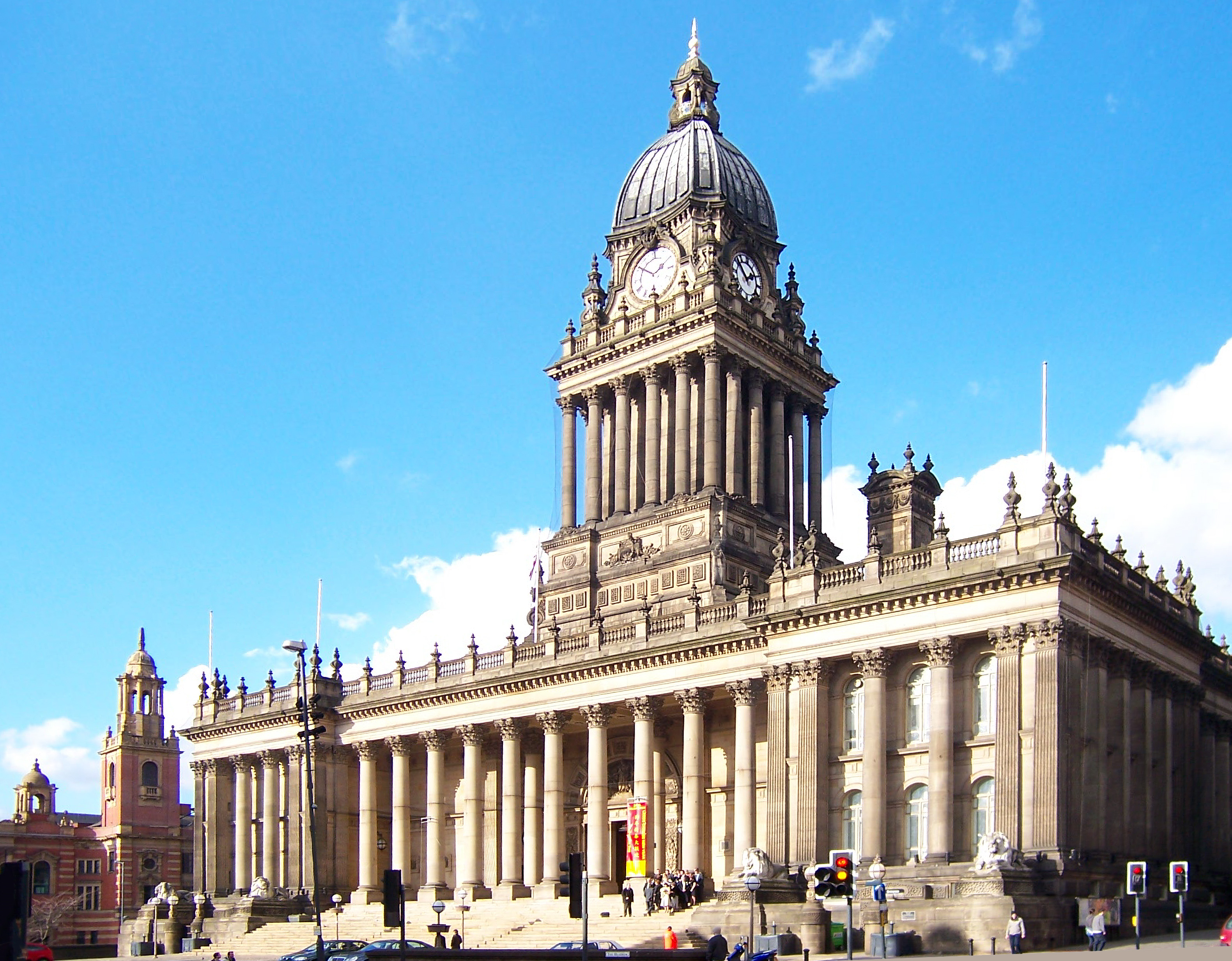 Rathaus von Leeds (England) (Rathaus = Town Hall) Quelle: selbsterstellt (18. Februar 2006)